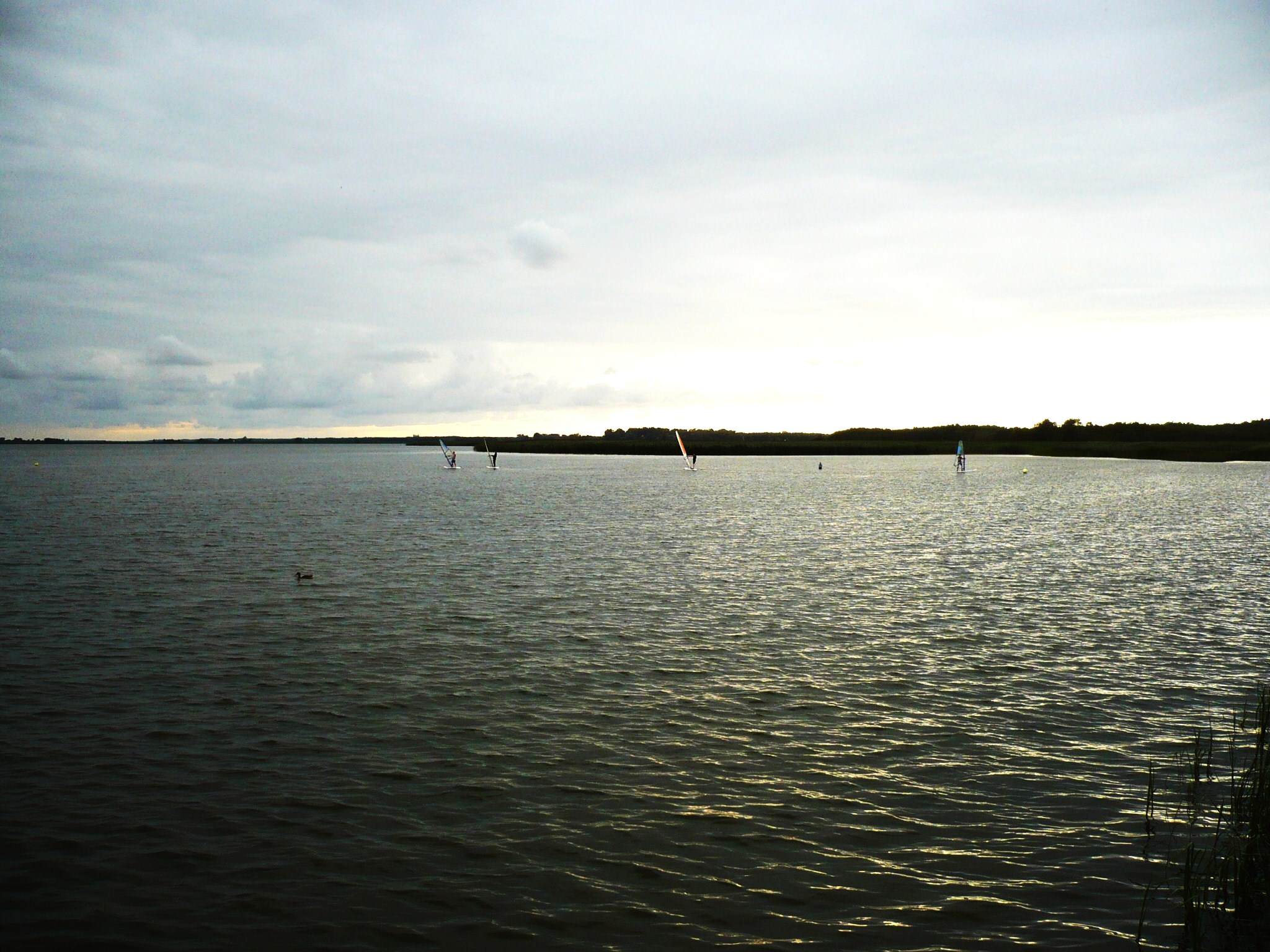 Dźwirzyno, Jezioro Resko